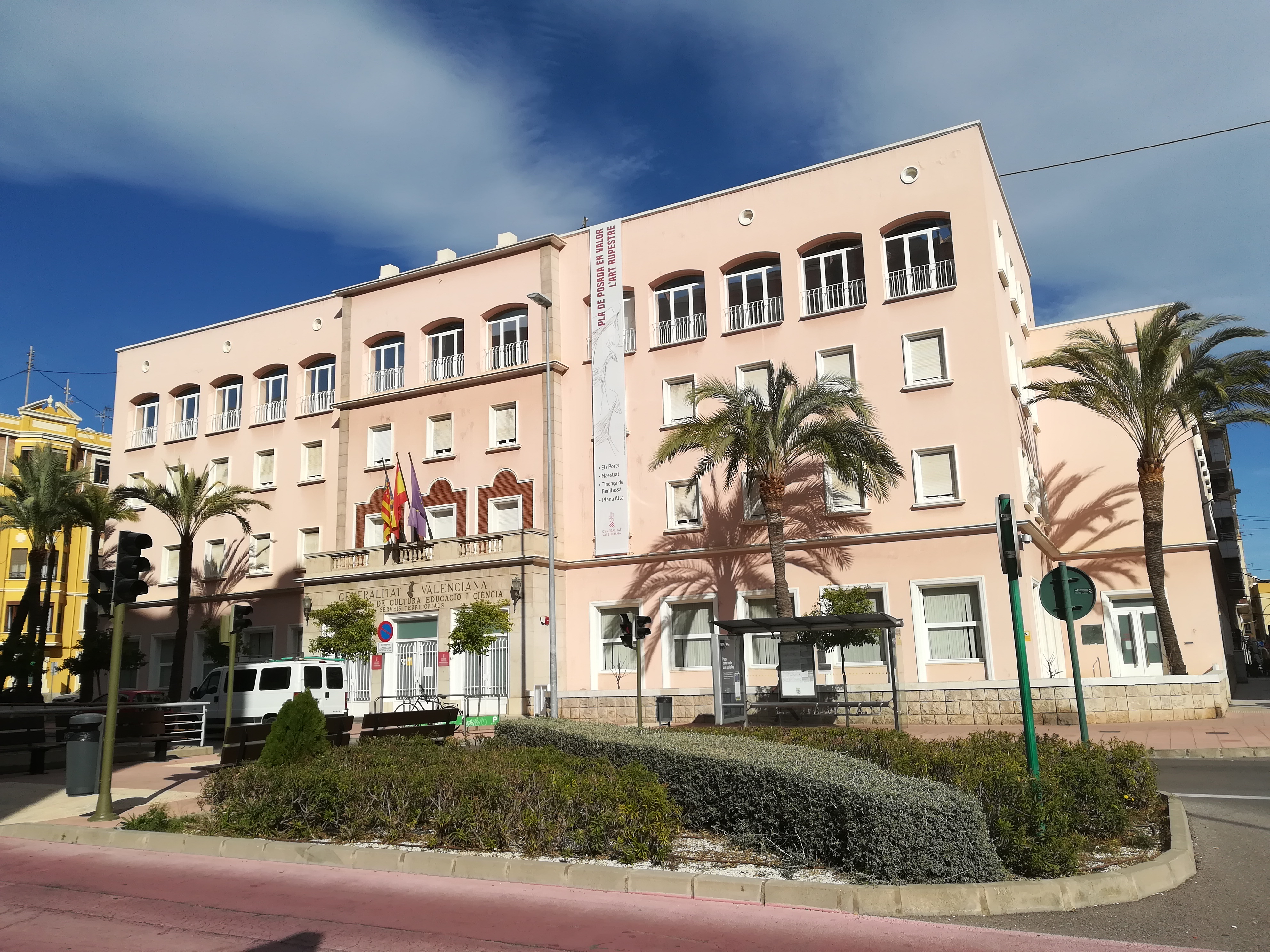 Seu de Conselleria d'Educació a Castelló de la Plana